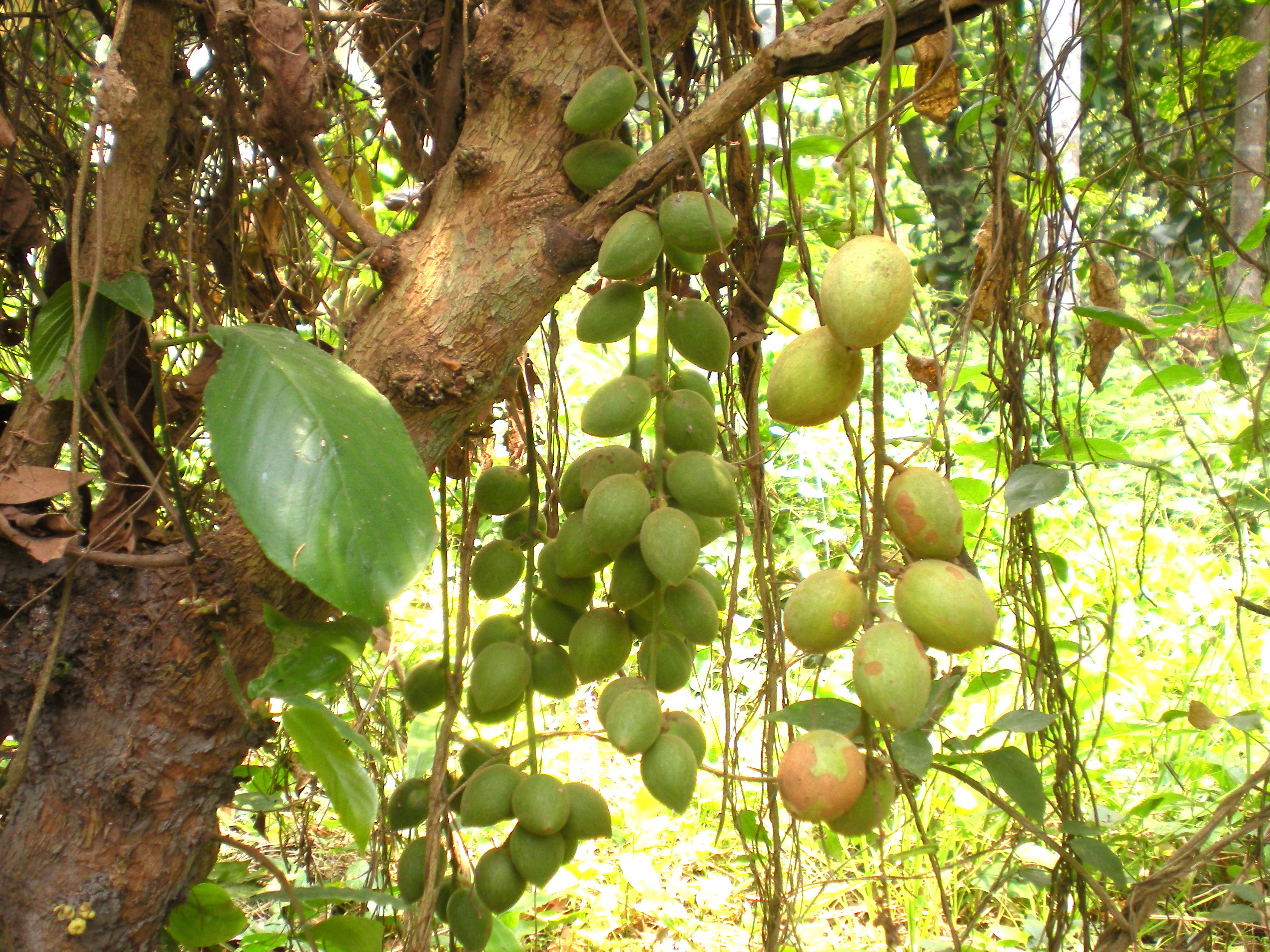 Chụp hình ở Xã Trung An, huyện Củ Chi, thành phố Hồ chí Minh, miền Nam Vietnam Taken in Trung An ward, Củ Chi district, Hồ chí Minh city, South Vietnam Vietnamese named : Dâu, Dâu ta, Dâu Gia, Dâu Da đất, Giâu Gia, Dâu Hạ Châu. Common names : Burmese grape